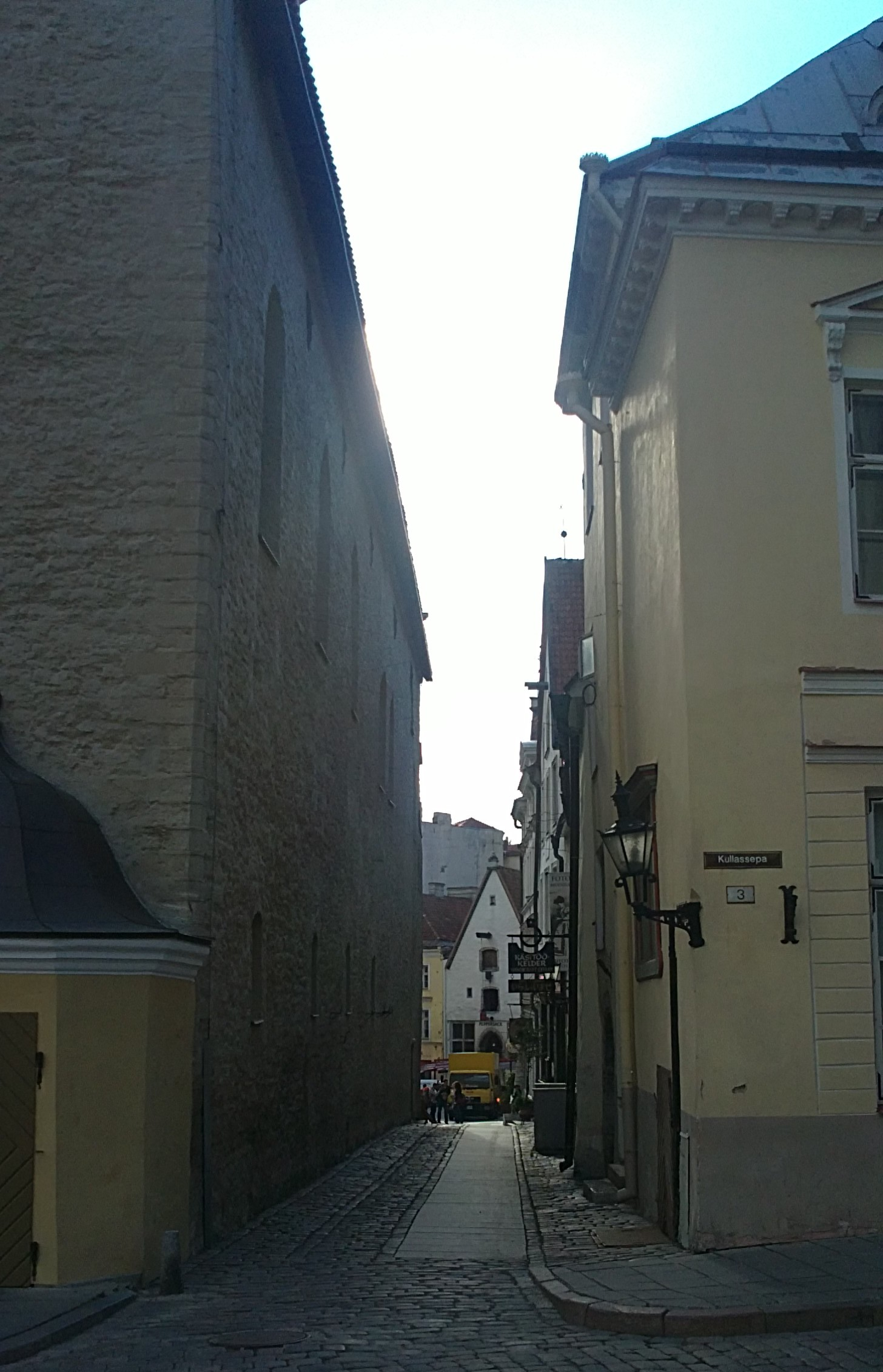 Raekoja tänav, Tallinna vanalinnas, vaade Dunkri tänava ja Kullassepa tänava ristmikult. Vasakul Tallinna raekoja hoone ja paremal Kullassepa tänava 2 hoone